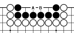 直四(圍棋)